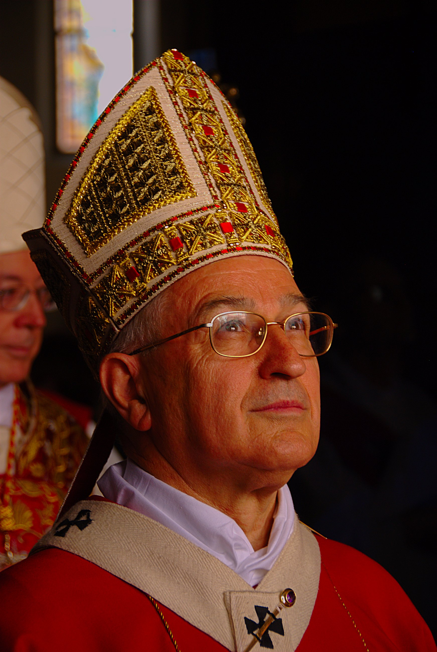 Luigi Bressan, arcivescovo metropolita di Trento